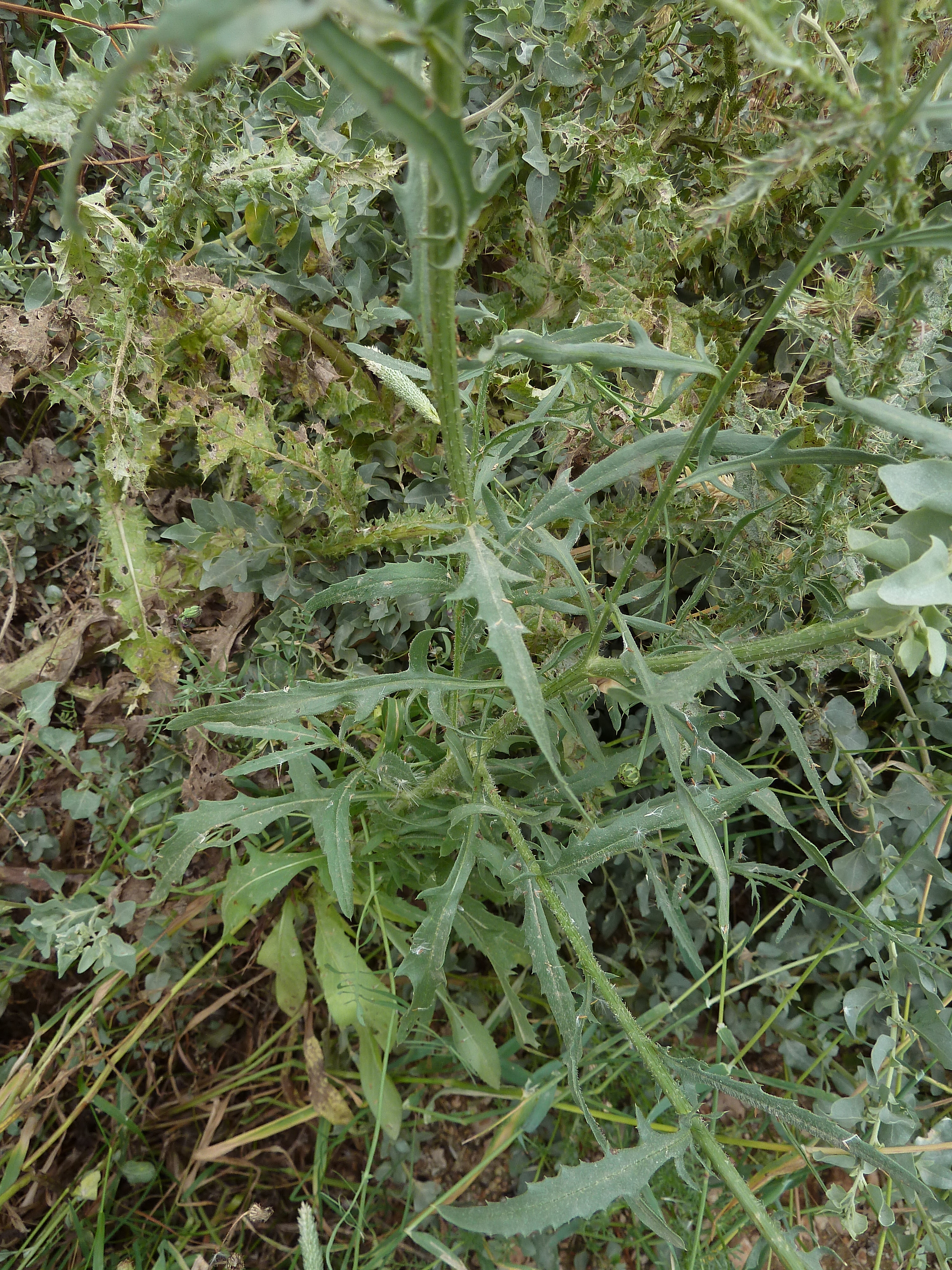 Mantisalca salmantica; hojas basales y medias - Albatera (Alicante, España)